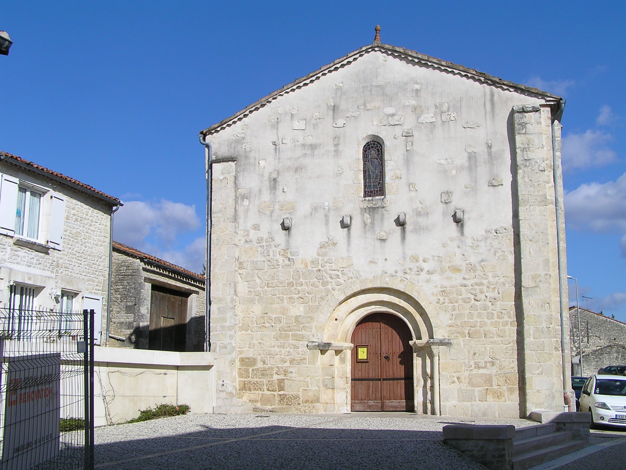 église de Brie (Charente)